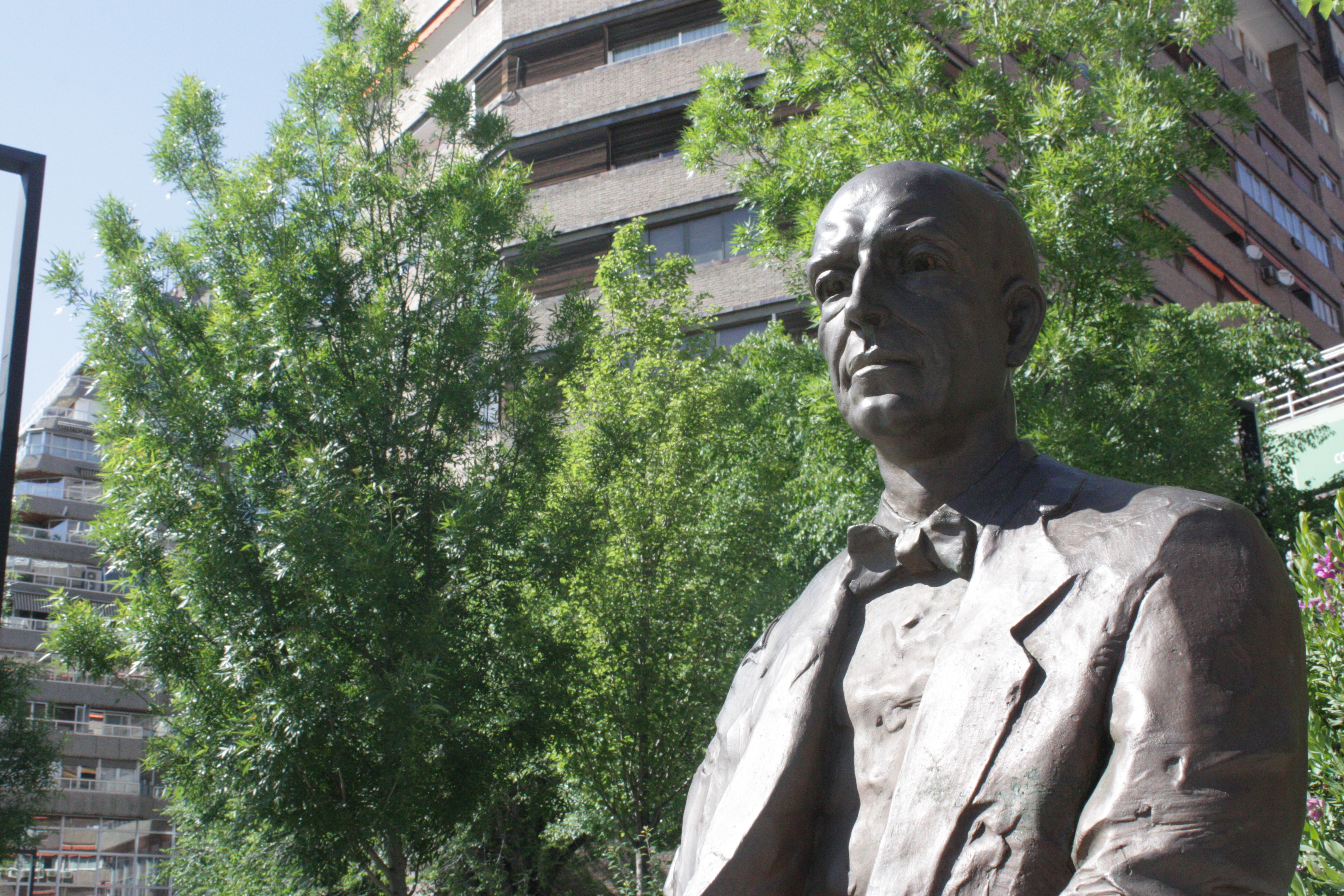 Estatua de Manuel de Falla, en la Avenida de la Constitución de Granada (España)